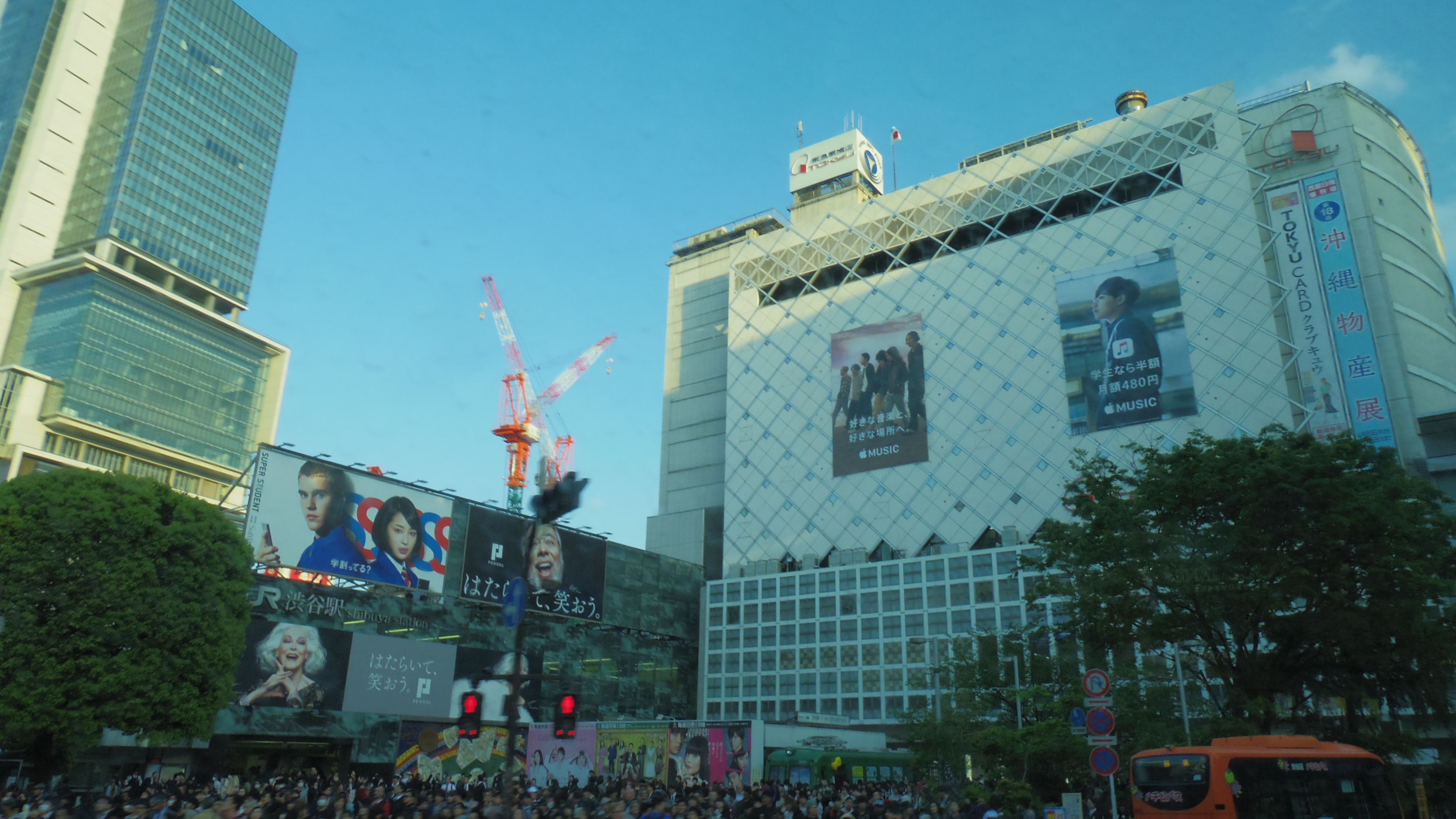 渋谷駅前、東急百貨店東横店。NHKスタジオパーク行バス車窓から撮影（2017年4月24日）